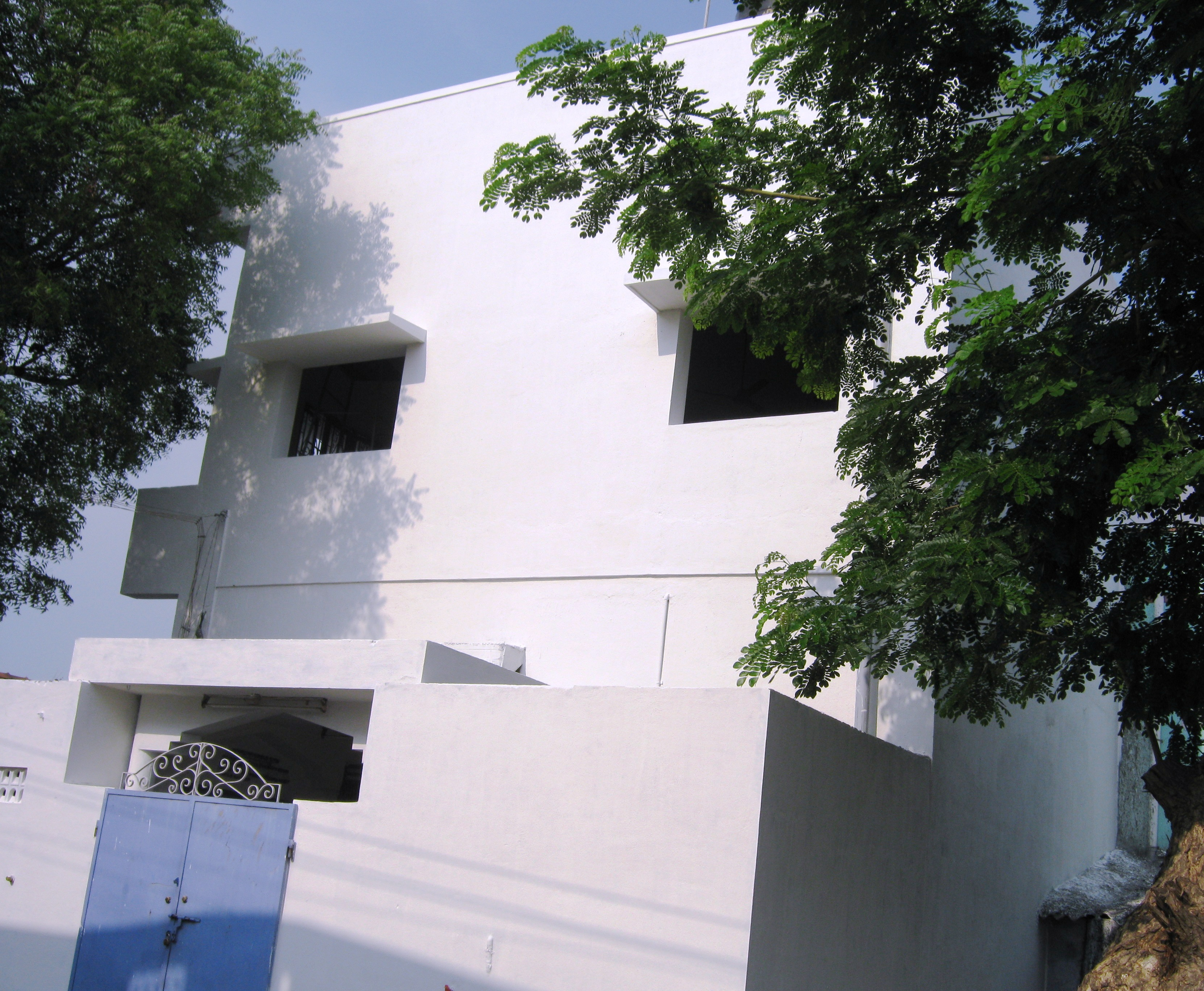 THOWHEEDJAMATH, PACHAPATTI, SALEM